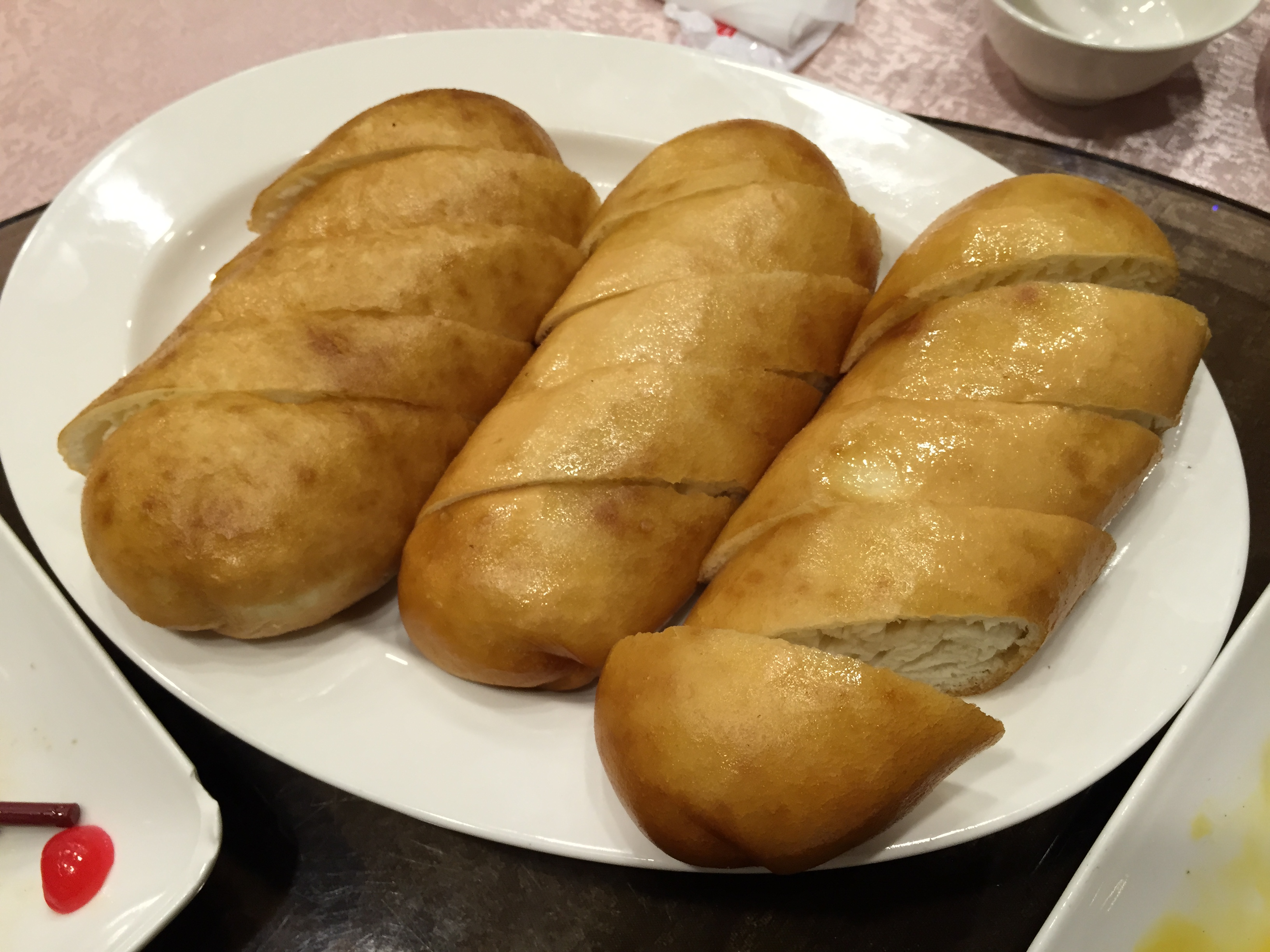 銀絲卷, 羊成小館, 羊城小館, 台北